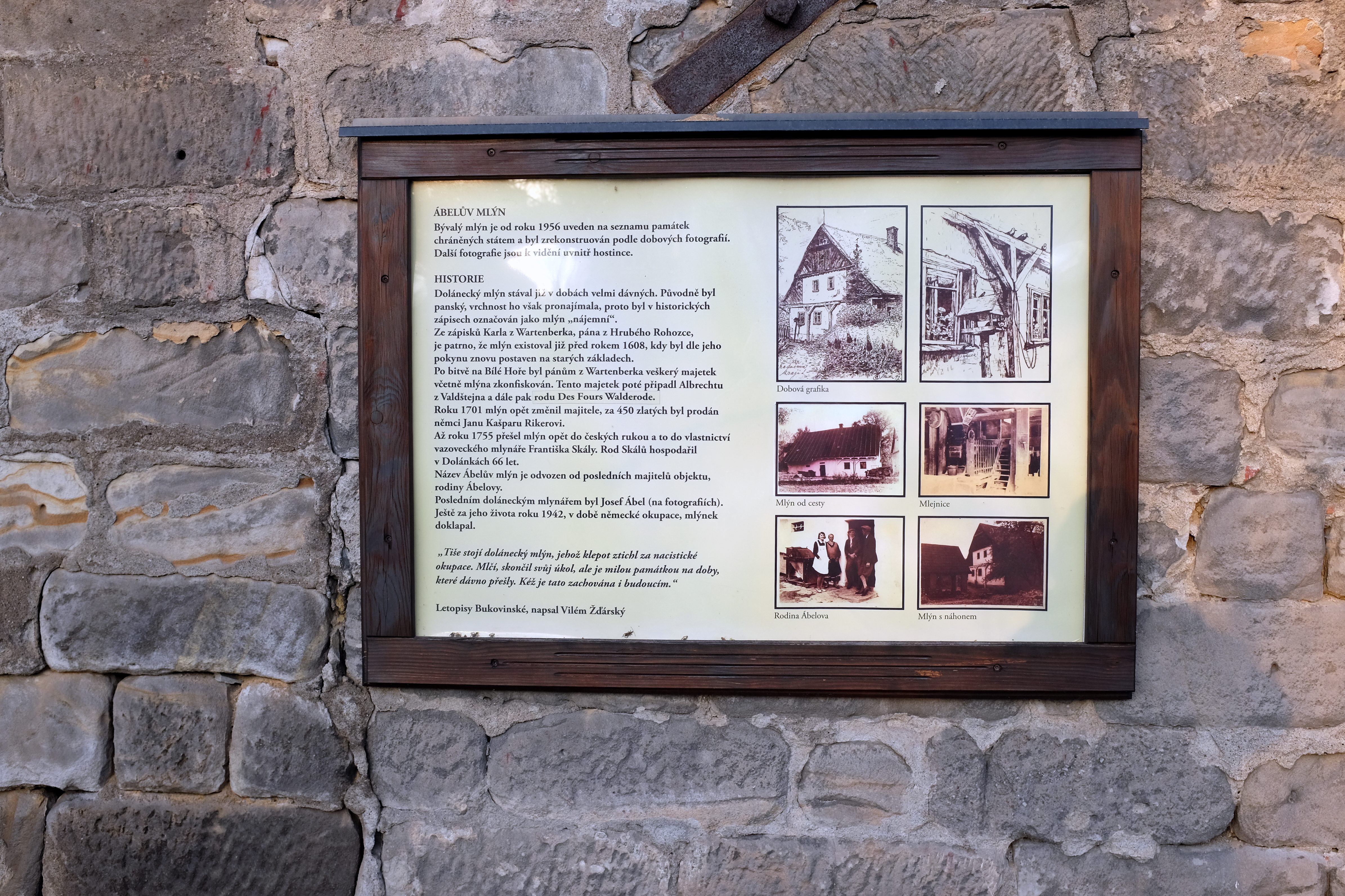 Abelův mlýn, Dolánky u Turnova 7, Dolánky u Turnova.